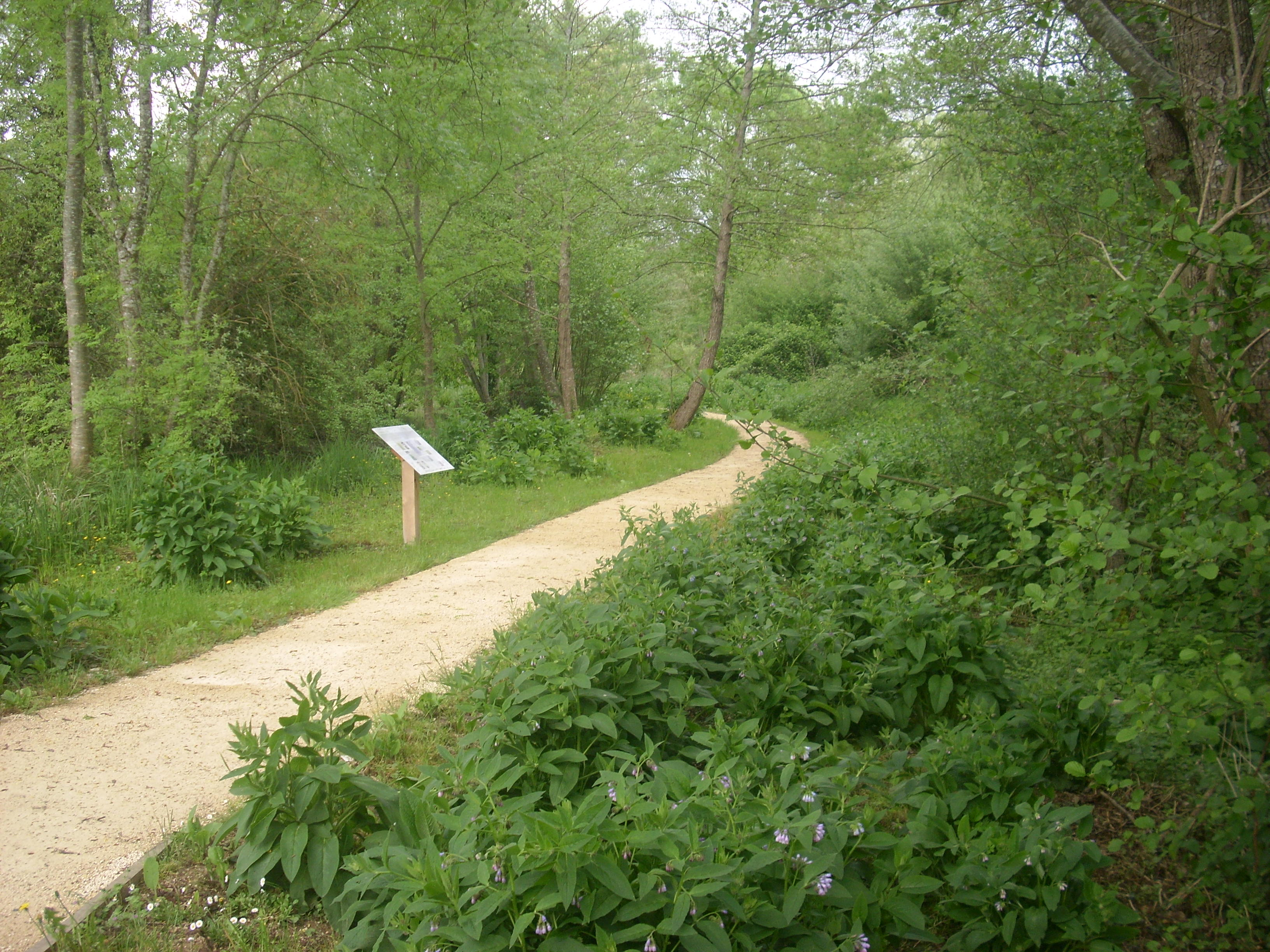 Passerelle de l'église monolithe, Gurat, Charente, France